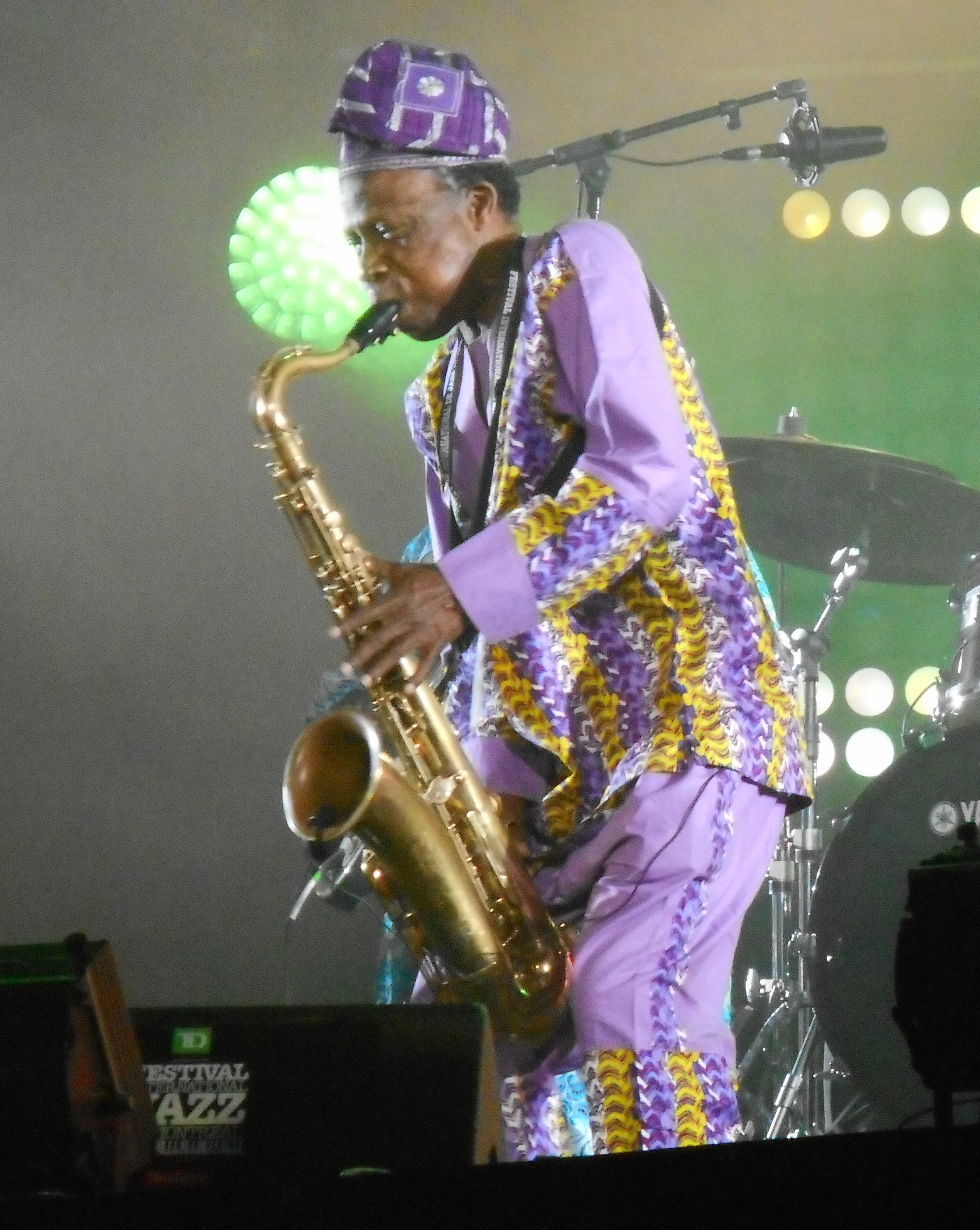 Spectacle de Orlando Julius & The Afrosoundz, le 6 juillet 2016, à la place des Festivals, dans le cadre du Festival international de jazz de Montréal